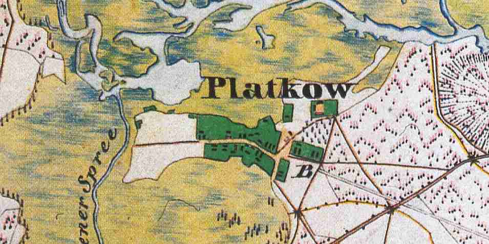 Plattkow, Ortsteil der Gemeinde Märkische Heide, Landkreis Dahme-Spreewald, Brandenburg, Deutschland, Ausschnitt aus dem Urmesstischblatt 3850 Kossenblatt von 1846